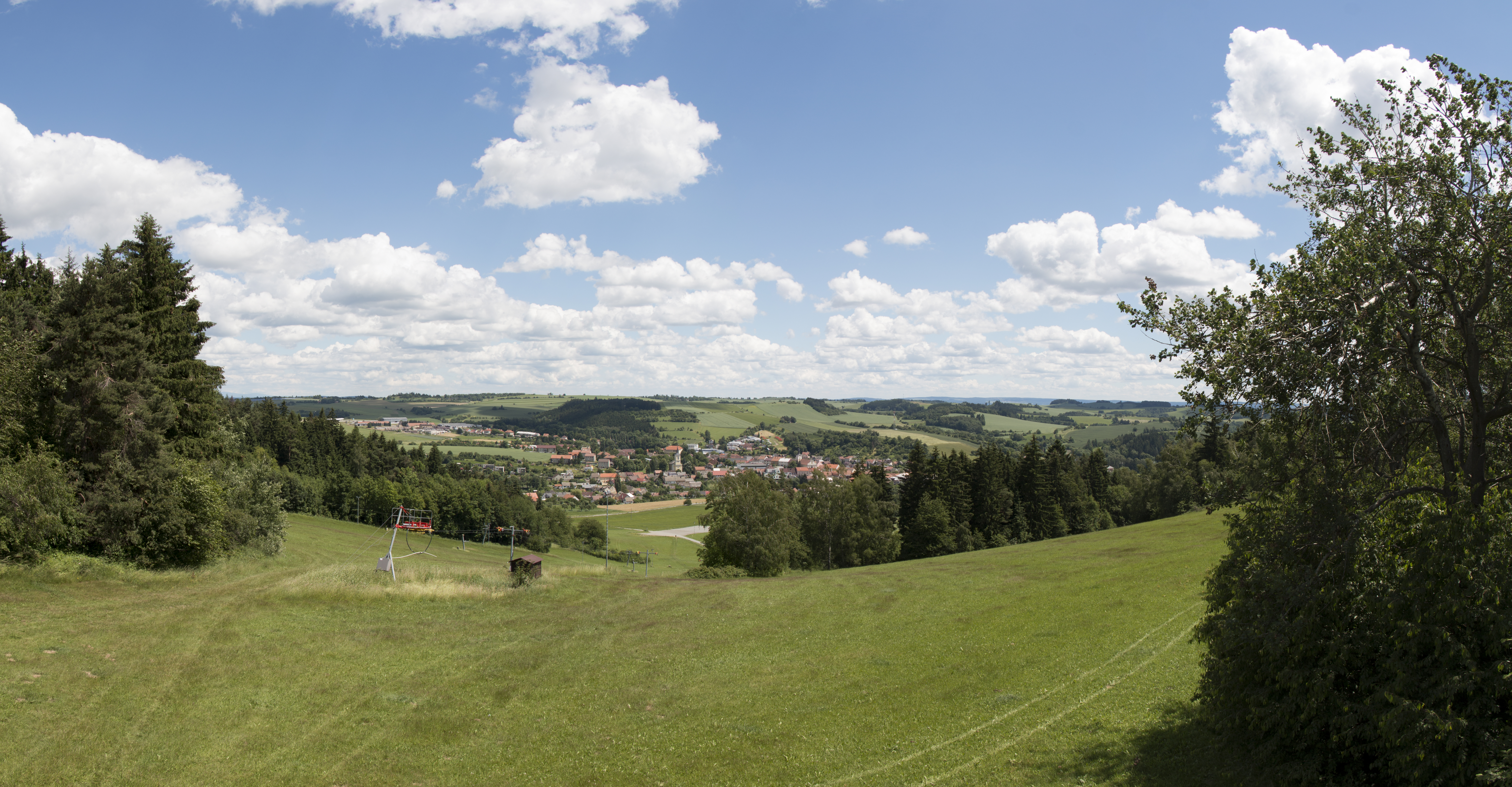 Olešnice (rozhledna) z 18.6.2016 - panoramatický výhled na sjezdovku a přilehlou obec